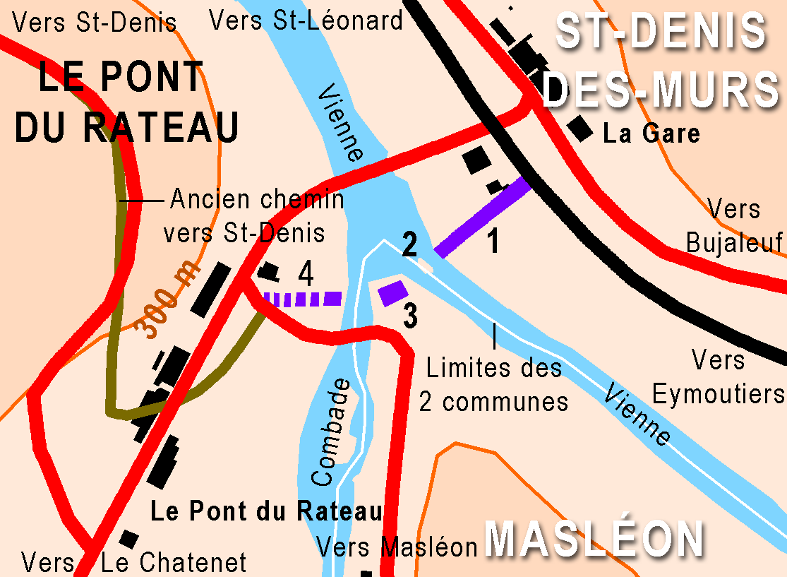 Position des restes du pont du Rateau à cheval sur la Vienne et la Combade et les communes de Masléon et Saint-Denis-des-Murs en Haute-Vienne.